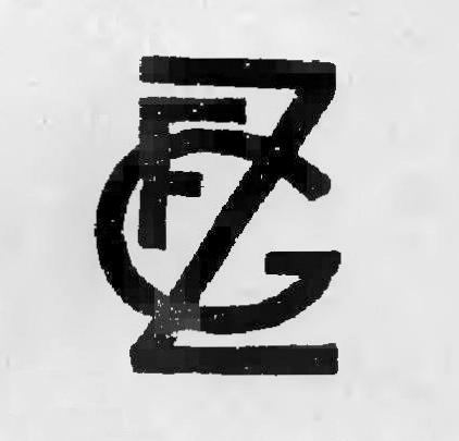 Logo - Fabryka Wagonów L. Zieleniewski i Fitzner-Gamper S.A, Sanok